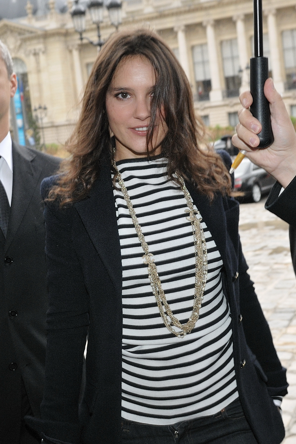 Défilé Channel printemps/été 2010 prêt-à-porter au Grand Palais (Avenue du Général Eisenhower - Paris 75008) Karl Lagerfeld a fait fort, en transformant le Grand Palais en étable géante. Des People en pagaille emmenés par Lily Allen (ambassadrice de la ligne Coco Cocoon) suivi de Bernadette Chirac, Claudia Schiffer, Rihanna, Virginie Ledoyen, Anna Wintour, Sean Lennon et Charlotte Kemp Muhl, Marie-Josée Croze, Prince accompagné de sa fiancée, et Irina Lazareanu, l'ex de Pete Doherty.